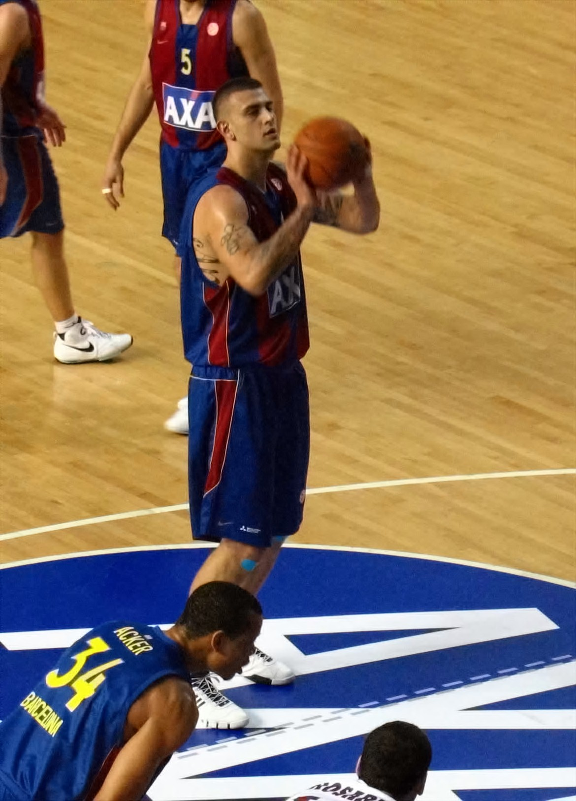 Mario Kasun en un pártido con el FC Barcelona en febrero de 2008